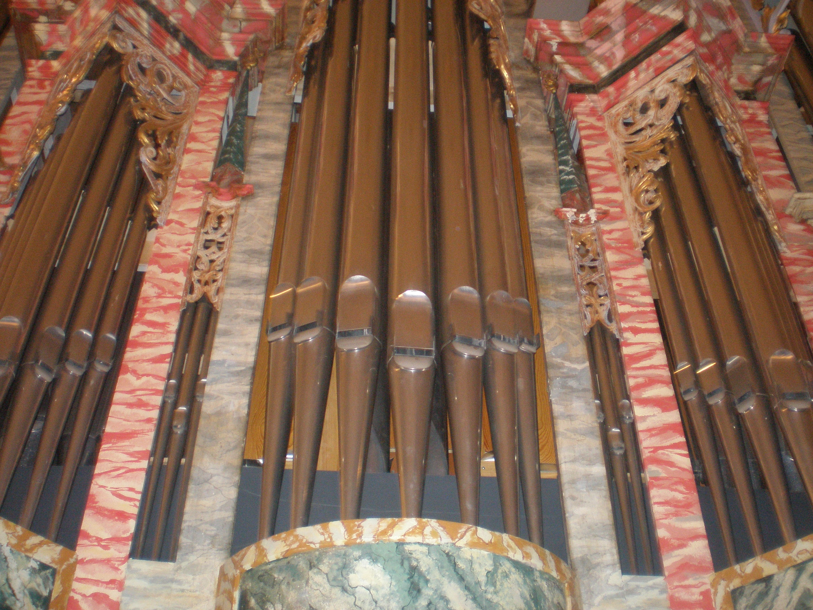 Svirale na orguljama varaždinske katedrale